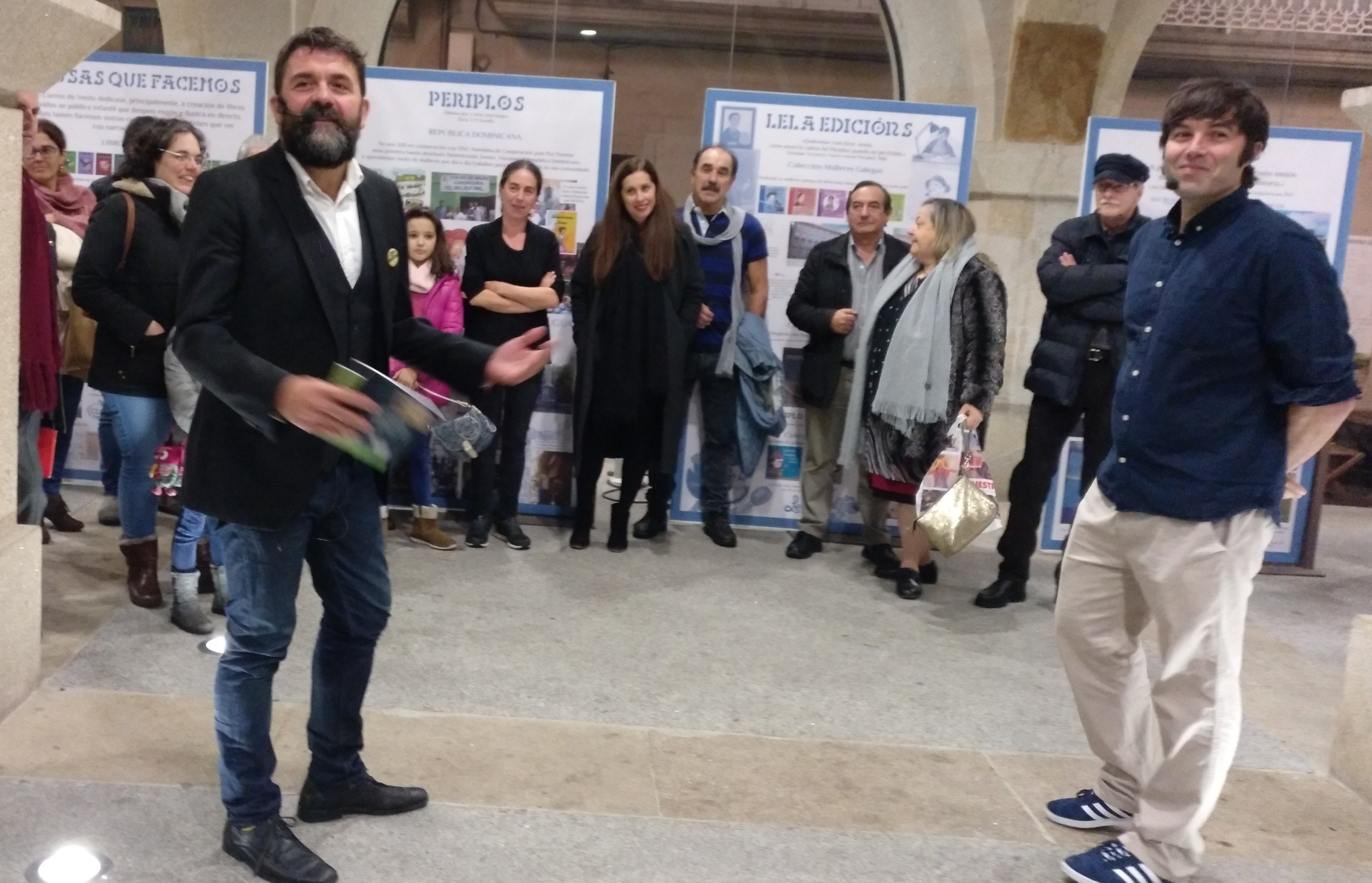 Polo correo do vento (Carlos Álavarez Taboada e Enrique Mauricio Iglesias) na Casa da Luz de Pontevedra o 30 de novembro de 2018